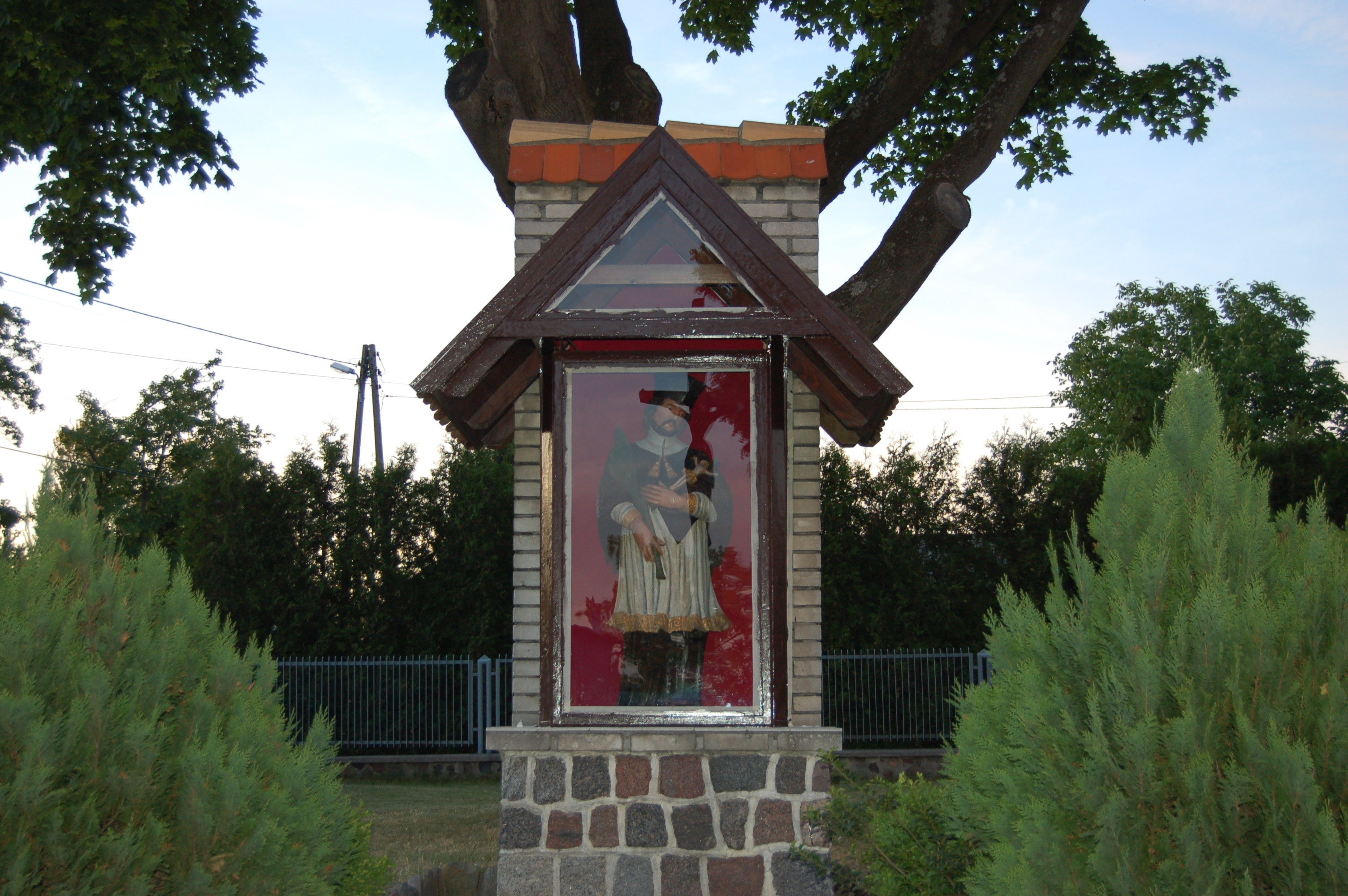 Kapliczka św. Jana Nepomucena przy kościele św. Krzyża w Rumi